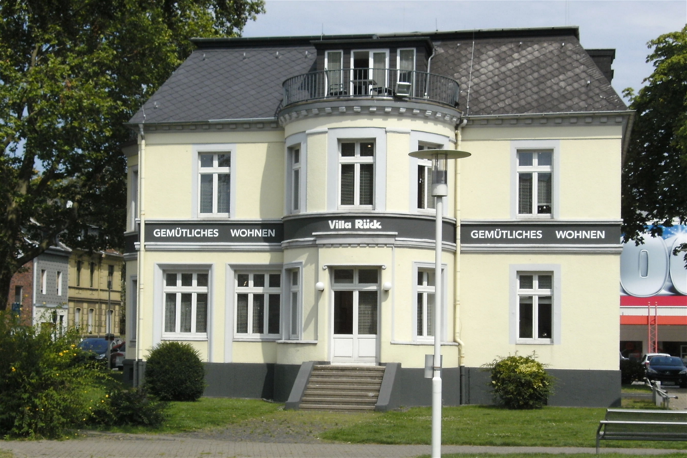 Die so genannte Villa Rück an der Straßburger Straße, Ecke Seilerstraße in Oberhausen, Rhld.